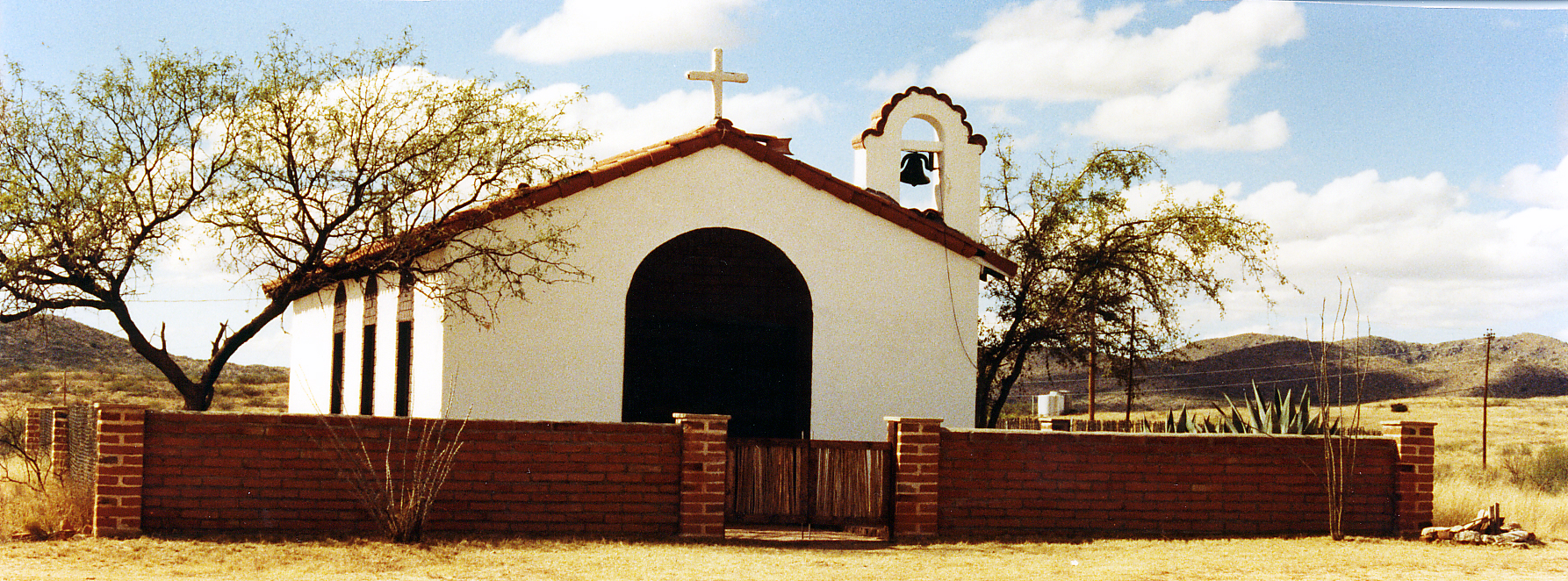 Church in Sasabe, Arizona 1990